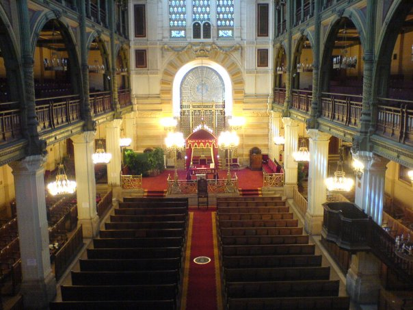 Intérieur de la synagogue de la rue des Tournelles à PARIS.